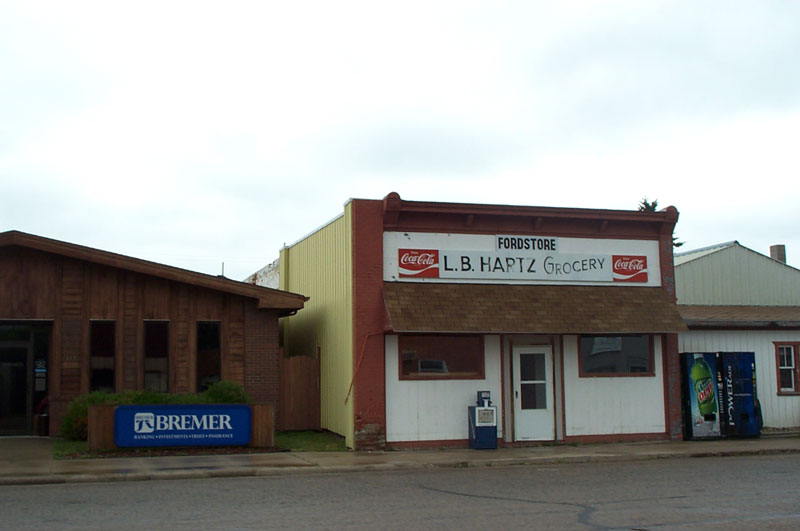 Fordville, North Dakota. From .